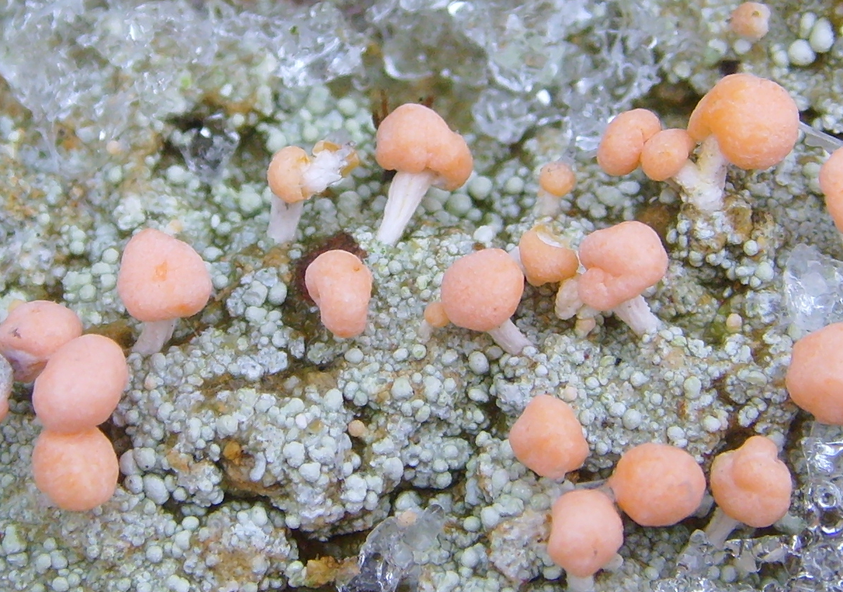 Dibaeis baeomyces, carrière Bonne-Nouvelle (Inzinzac-Lochrist, Morbihan, Bretagne, France)